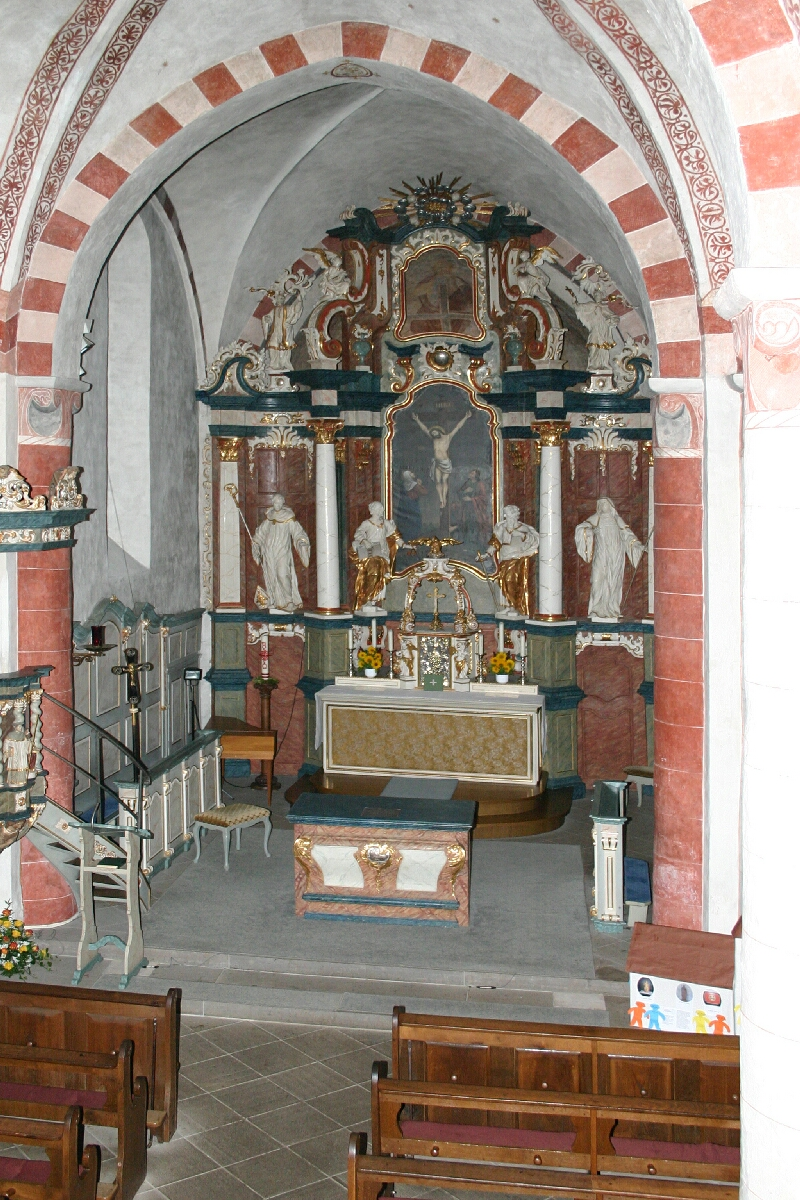 Altar der Kirche in Wormbach